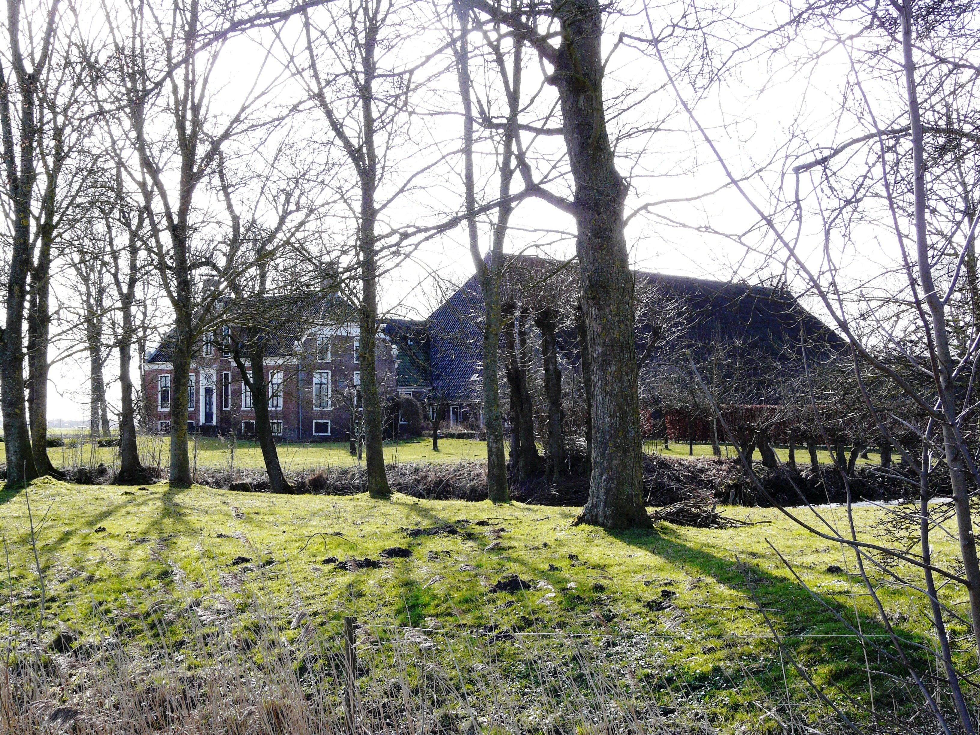 De Teenstraheerd die in 1796 werd gebouwd door Douwe Teenstra in de Oude Ruigezandsterpolder.